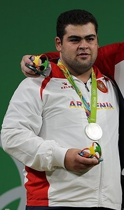 Серебряный призёр Летних Олимпийских игр в Рио-де-Жанейро в соревнованиях по тяжелой атлетике армянский штангист Гор Минасян.